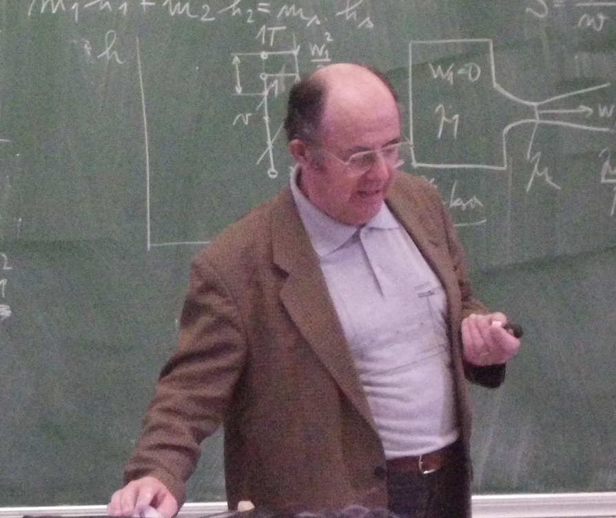 Prof. Ing. Radim MAREŠ CSc.